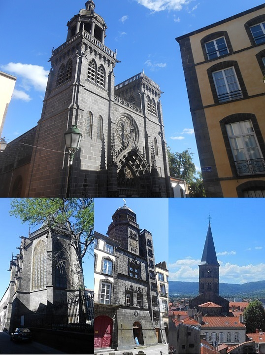 Montage ville de Riom : De haut en bas de gauche à droite.